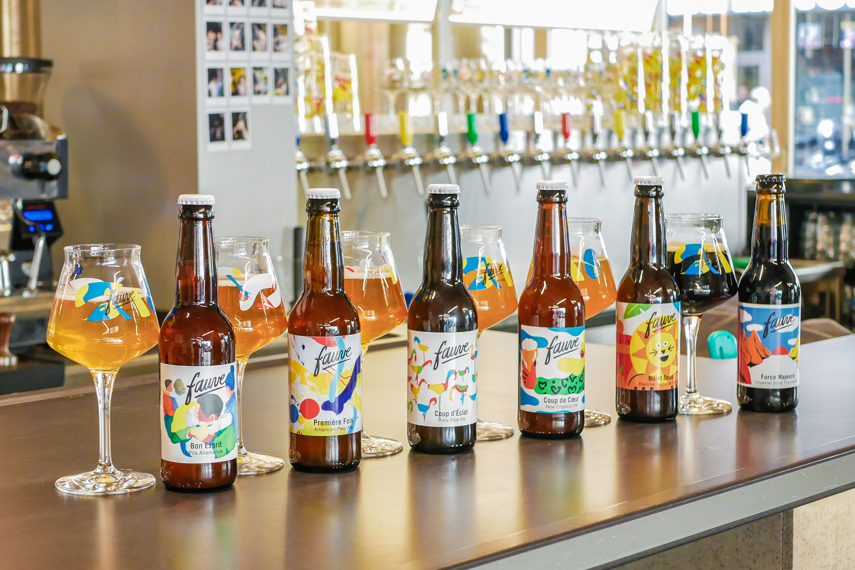 Une sélection de bouteilles de bières artisanale "Fauve Craft Bière" sur le comptoir du restaurant / bar à bière / Micro-brasserie "Les Cuves de Fauve" (brewpub) au 64 rue de Charonne 75011 Paris.